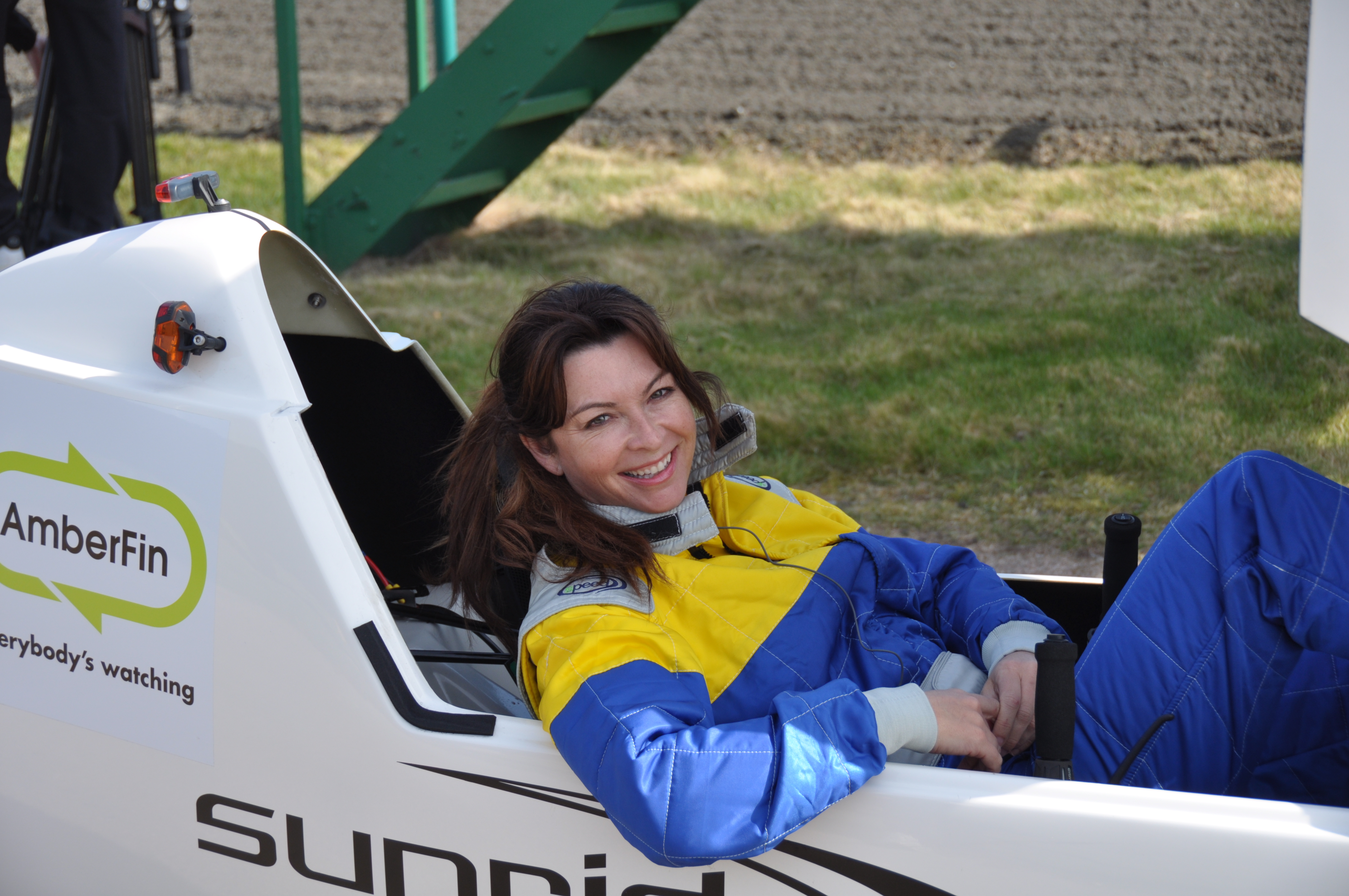 Suzi Perry in Sunrider vehicle, Gadget Show, 2011